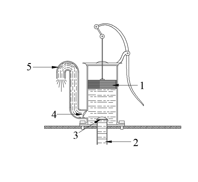 1 - stūmoklis, 2 - įtekėjimo anga, 3 - B vožtuvas, 4 - A vožtuvas, 5 - ištekėjimo anga